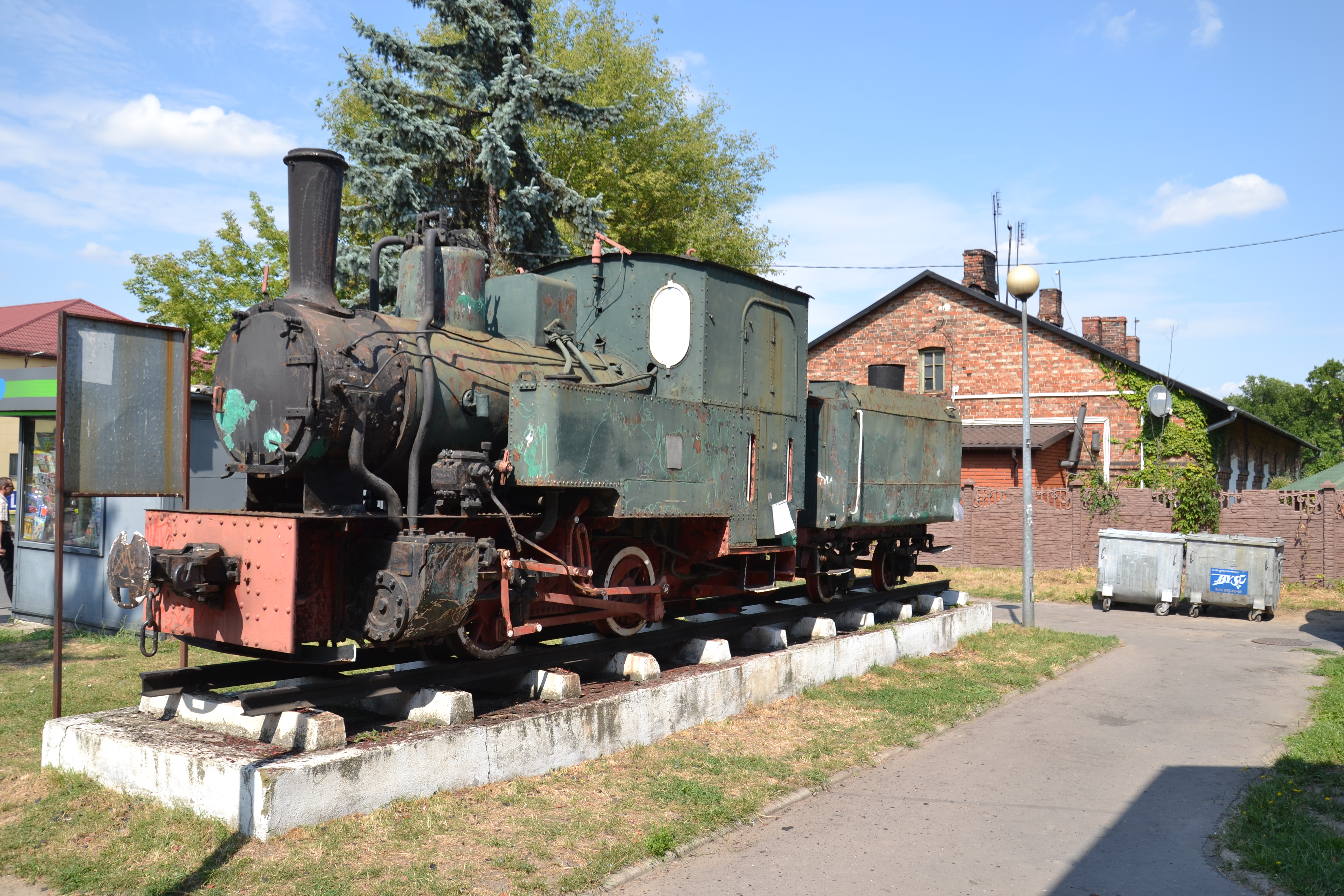 Parowóz z cukrowni Dobre przed dworcem kolejowym This photo was taken during Railway Wikiexpedition 2015 set up by Wikimedia Polska Association in cooperation with Fundacja Grupy PKP.You can see all photographs in category Wikiekspedycja kolejowa 2015.